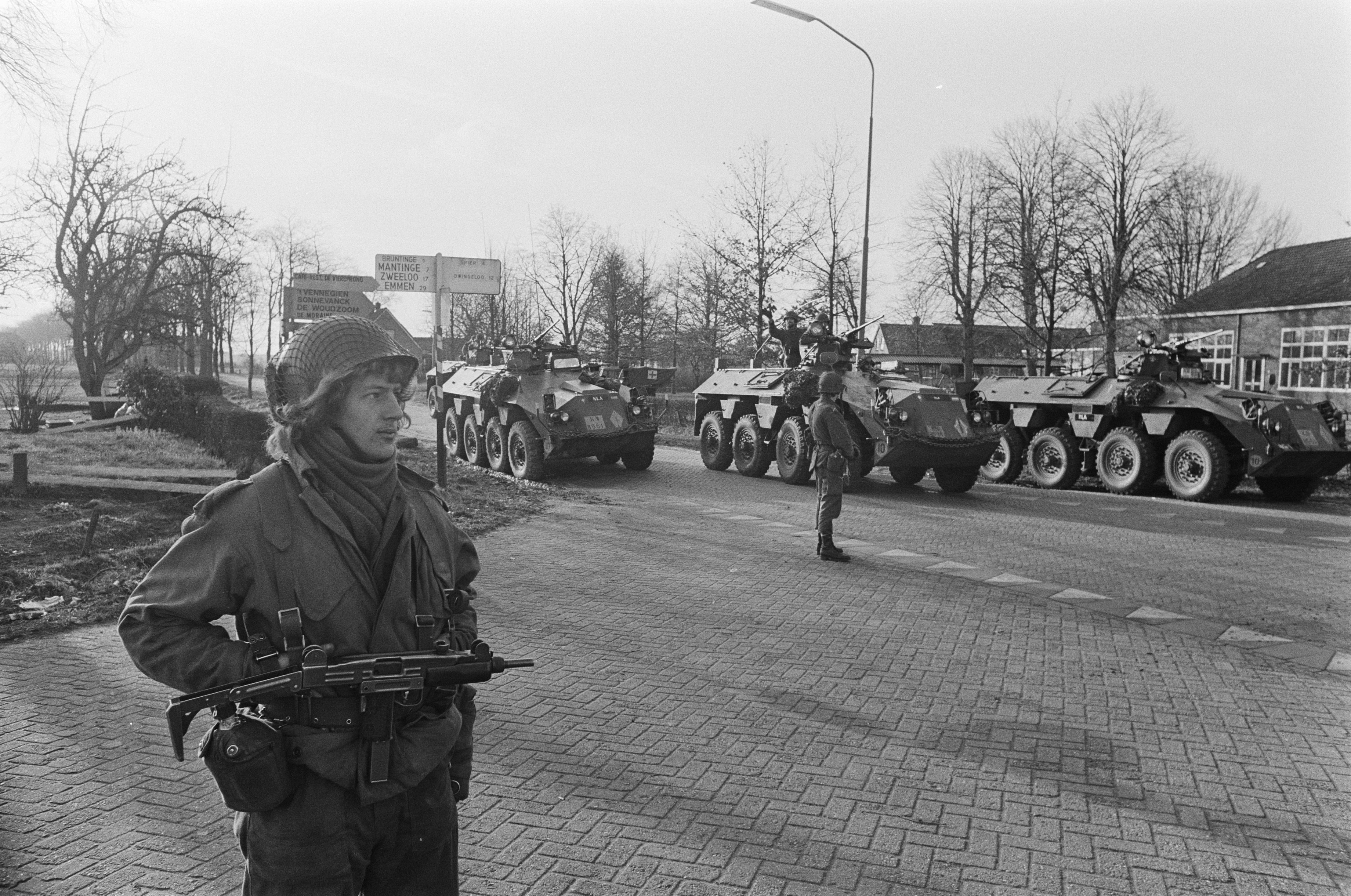 Collectie / Archief : Fotocollectie Anefo Reportage / Serie : [ onbekend ] Beschrijving : Treingijzeling Wijster (zesde en zevende dag); afzetting met gewapende militairen en pantserwagens Datum : 7 december 1975 Locatie : Drenthe, Wijster Trefwoorden : MILITAIREN, PANTSERWAGENS, Treinen, gijzelingen Fotograaf : Verhoeff, Bert / Anefo Auteursrechthebbende : Nationaal Archief Materiaalsoort : Negatief (zwart/wit) Nummer archiefinventaris : bekijk toegang 2.24.01.05 Bestanddeelnummer : 928-3118